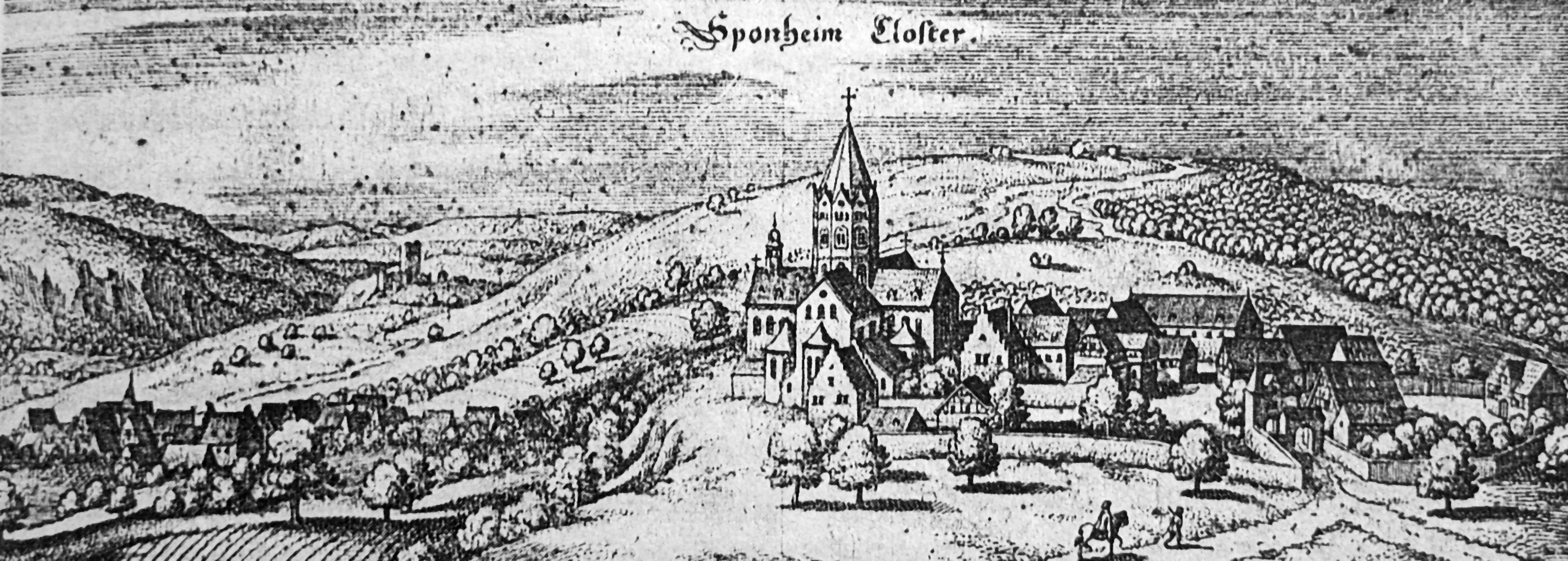 Kloster Sponheim bei Bad Kreuznach/Deutschland